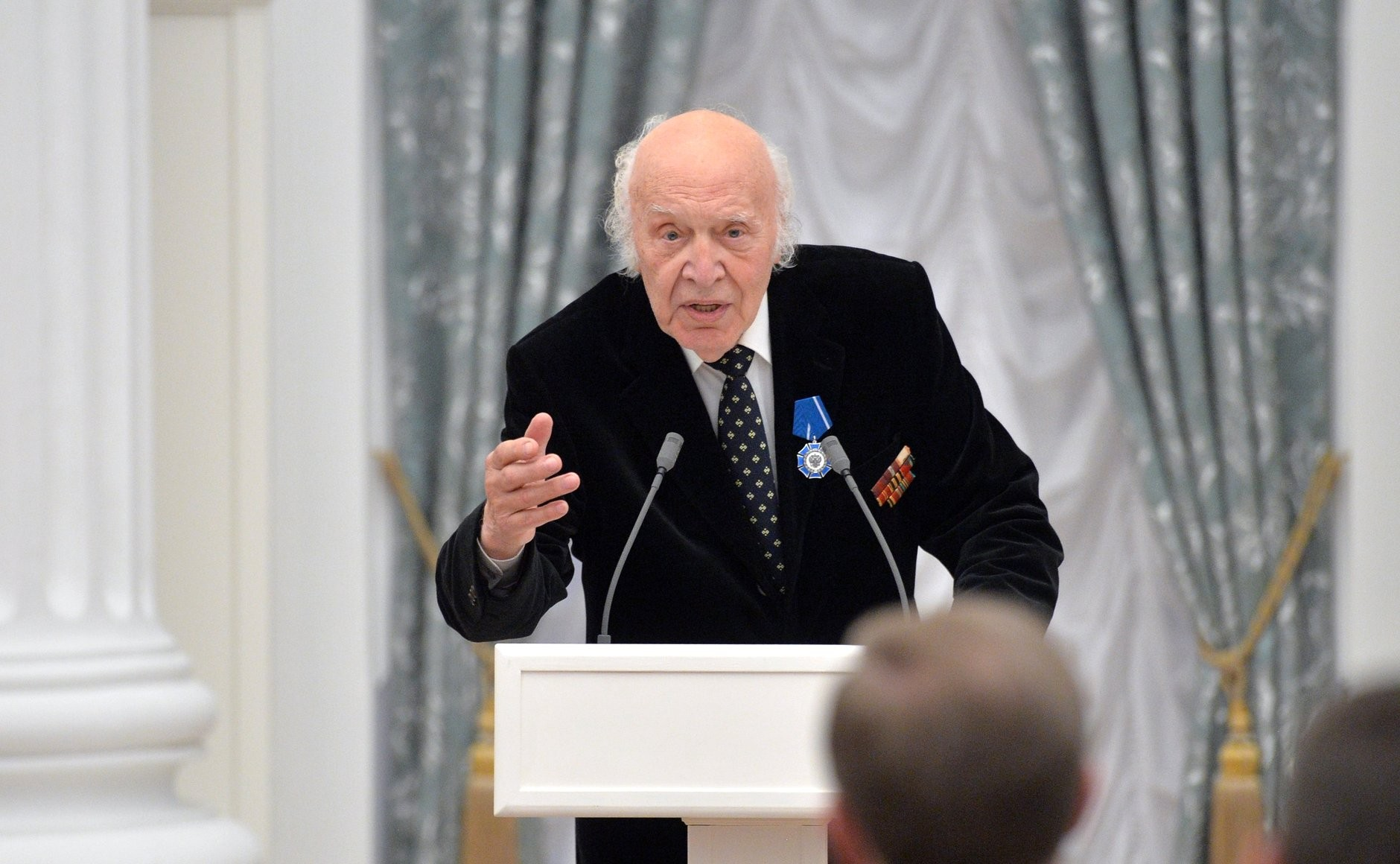 Церемония вручения государственных наград Российской Федерации. Народный артист России Виктор Балашов.